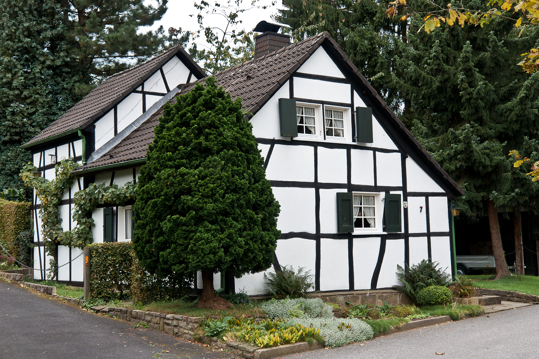 Rösrath, Denkmalnummer 51, Durbusch 7 This is a photograph of an architectural monument.